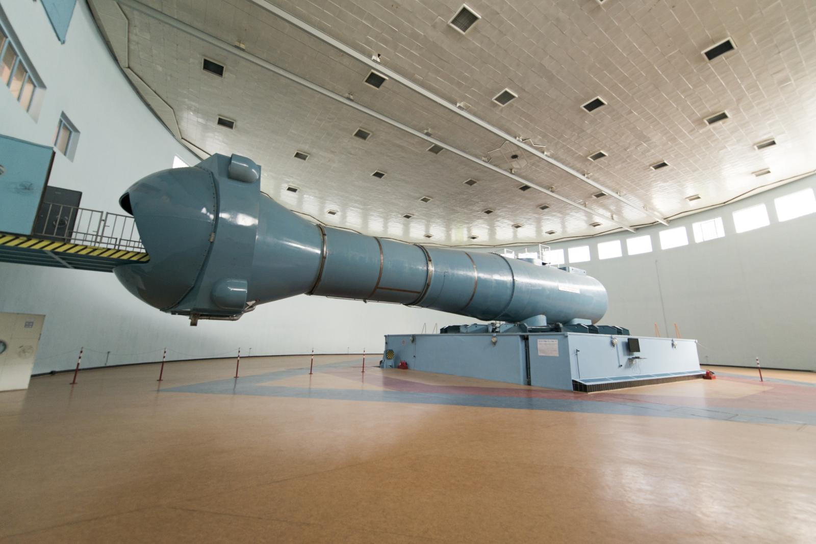 Centrifuge